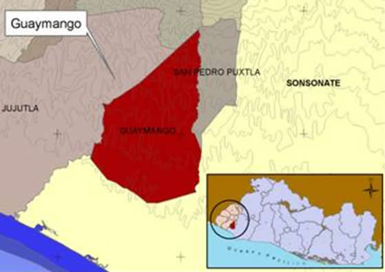 Ubicación Geográfica de Guaymango